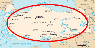 Kaart van Turkije van CIA World factbook, enkel verkleind en ruwweg Klein-Azie met een rode ellips aangegeven. Misschien kan ik of iemand anders er nog wat beters van bakken...